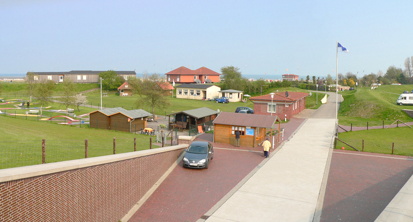 Schillig, Strandanlagen und Minigolfplatz